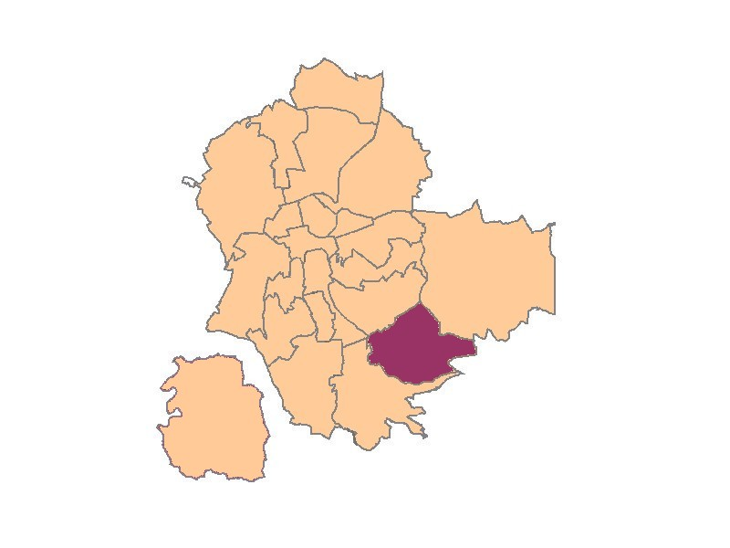 plans de saint-etienne Quartier La Métare La Palle Le Portail Rouge